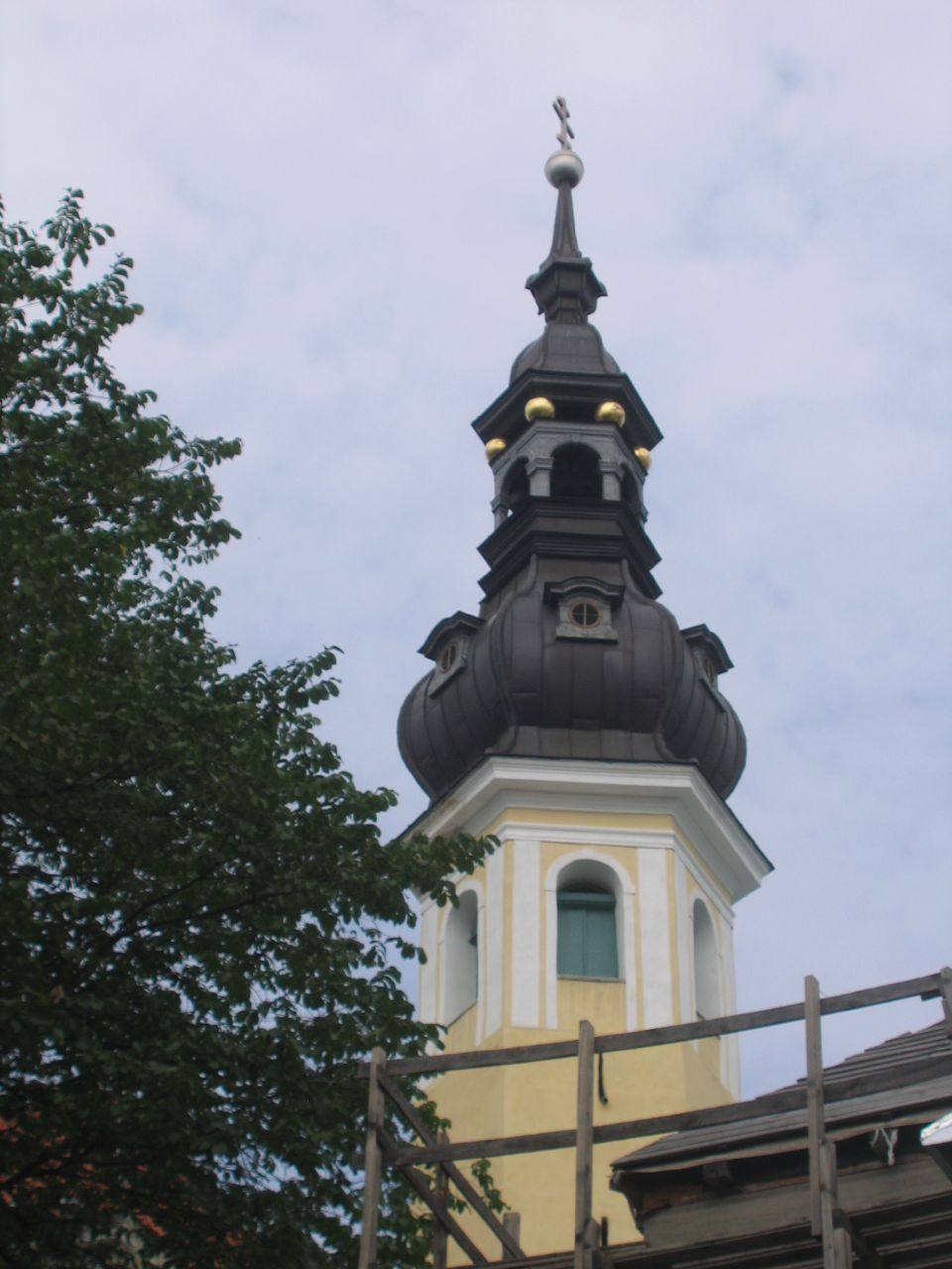 Tallinna Issandamuutmise kirik